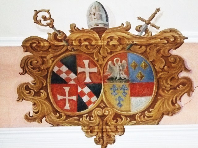 Wallfahrtskirche St. Simon und Judas Thaddäus, Wennedach, Stadt Ochsenhausen (Landkreis Biberach) Wappen, (optisch) links Kloster Heggbach, (optisch) rechts Äbtissin Maria Aleydis Zech